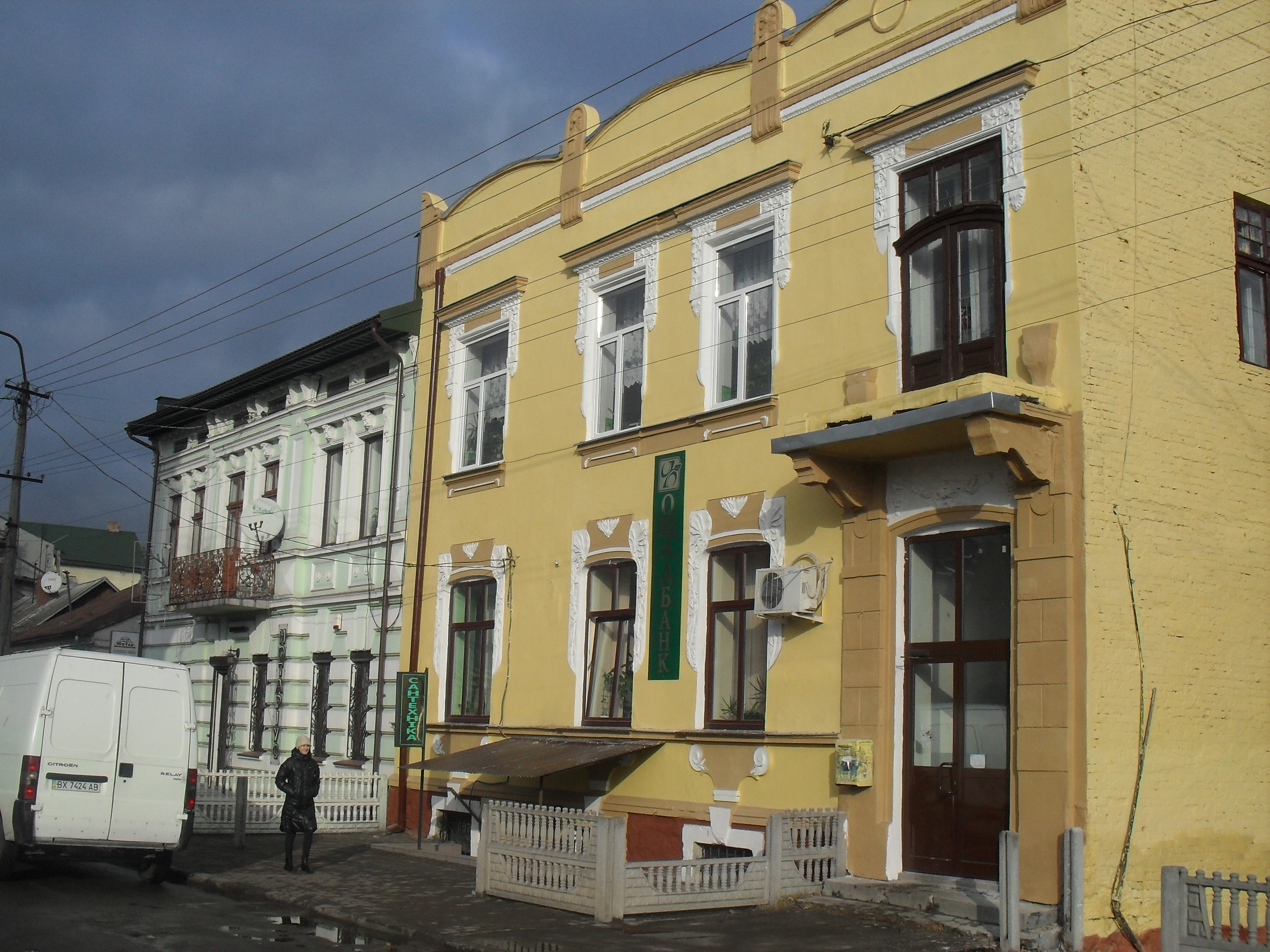 Житловий будинок, вул. Грушевського, 17, Рава-Руська